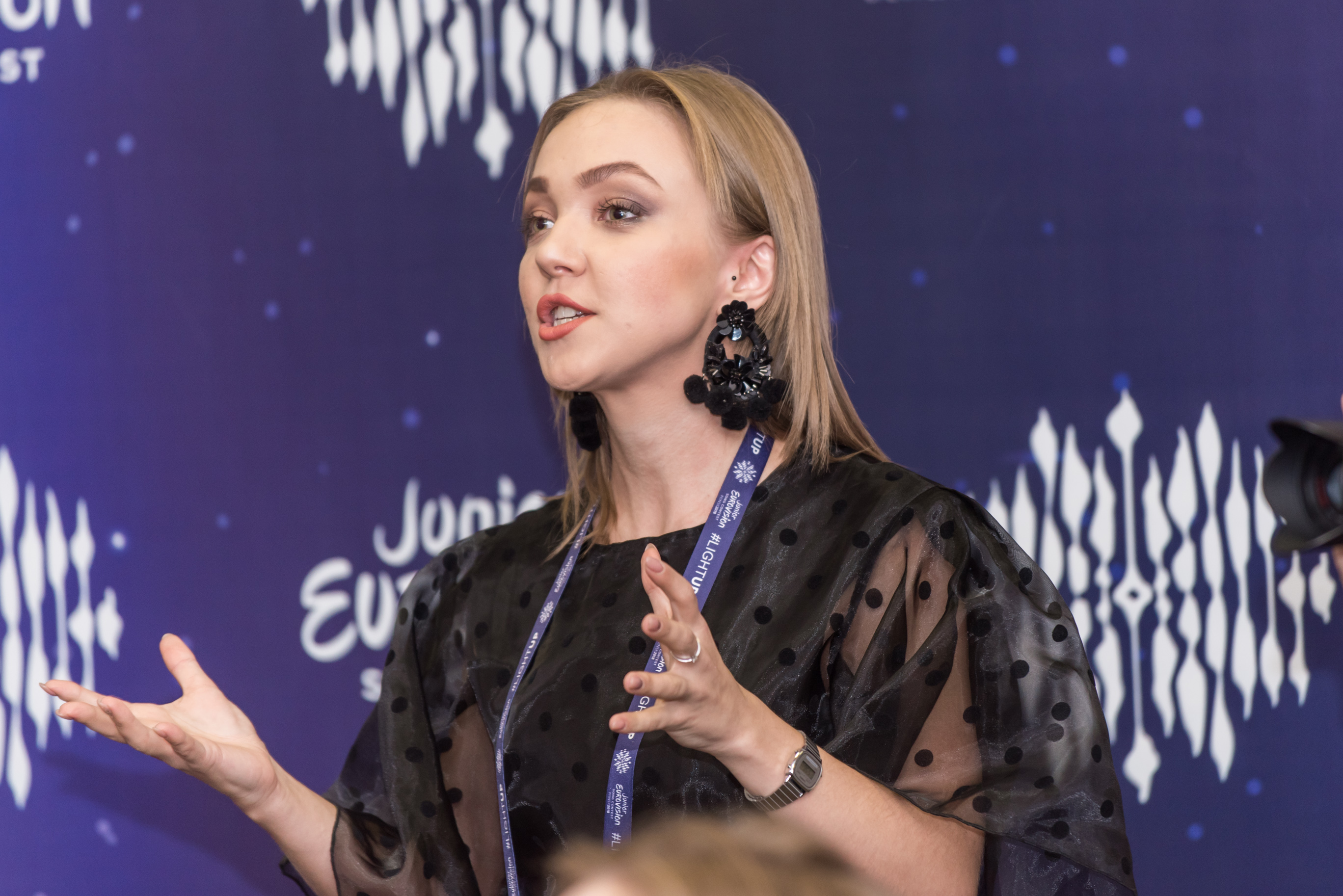 Ольга Сацюк на пресс-конференции Детского Евровидения 2018.